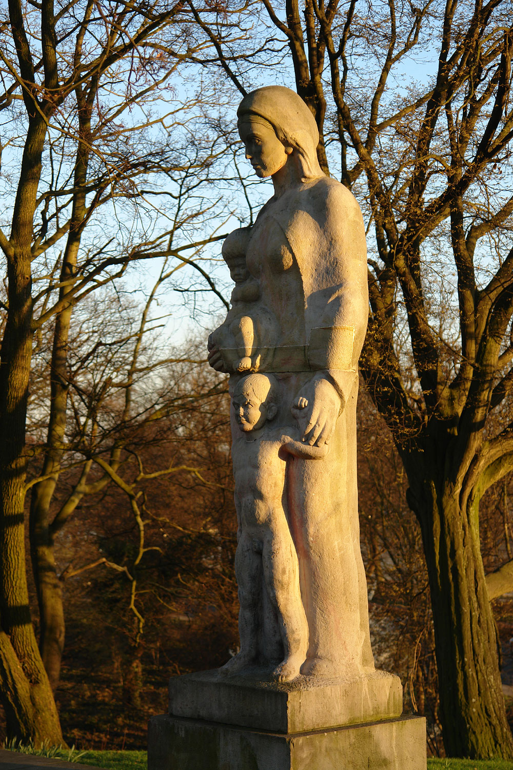 Statue "Mutter und Kinder" von Ernst Gorsemann. Standort: Wallanlagen auf dem Hügel Altmannshöhe